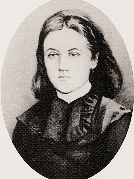 Natal'ja Nikolaevna Olovennikova (1855-1924)